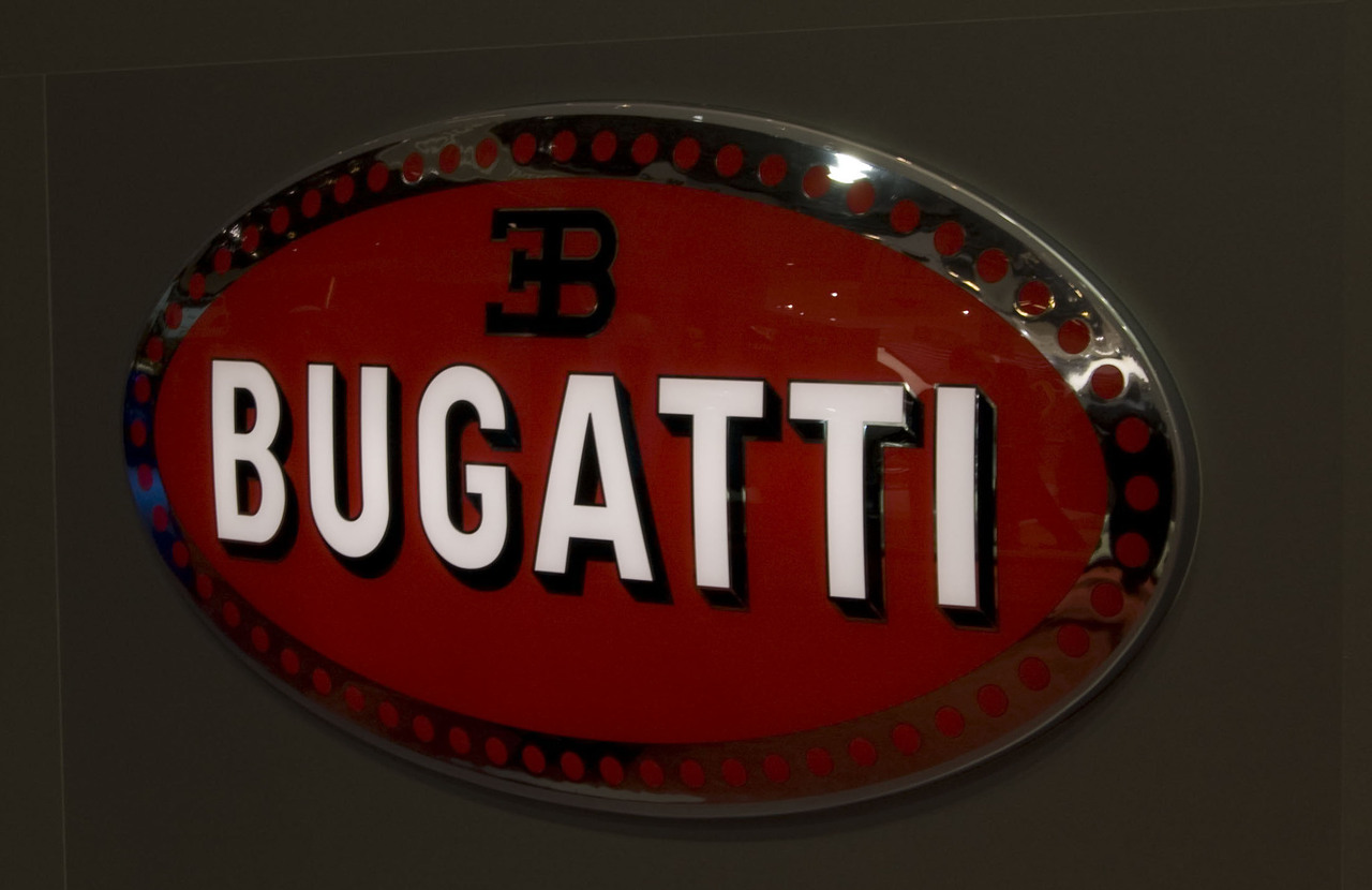 Bugatti Veyron Bleu Centenaire en el Salón de Ginebra 2009.Bugatti Veyron Bleu Centenaire en el Salón de Ginebra 2009.